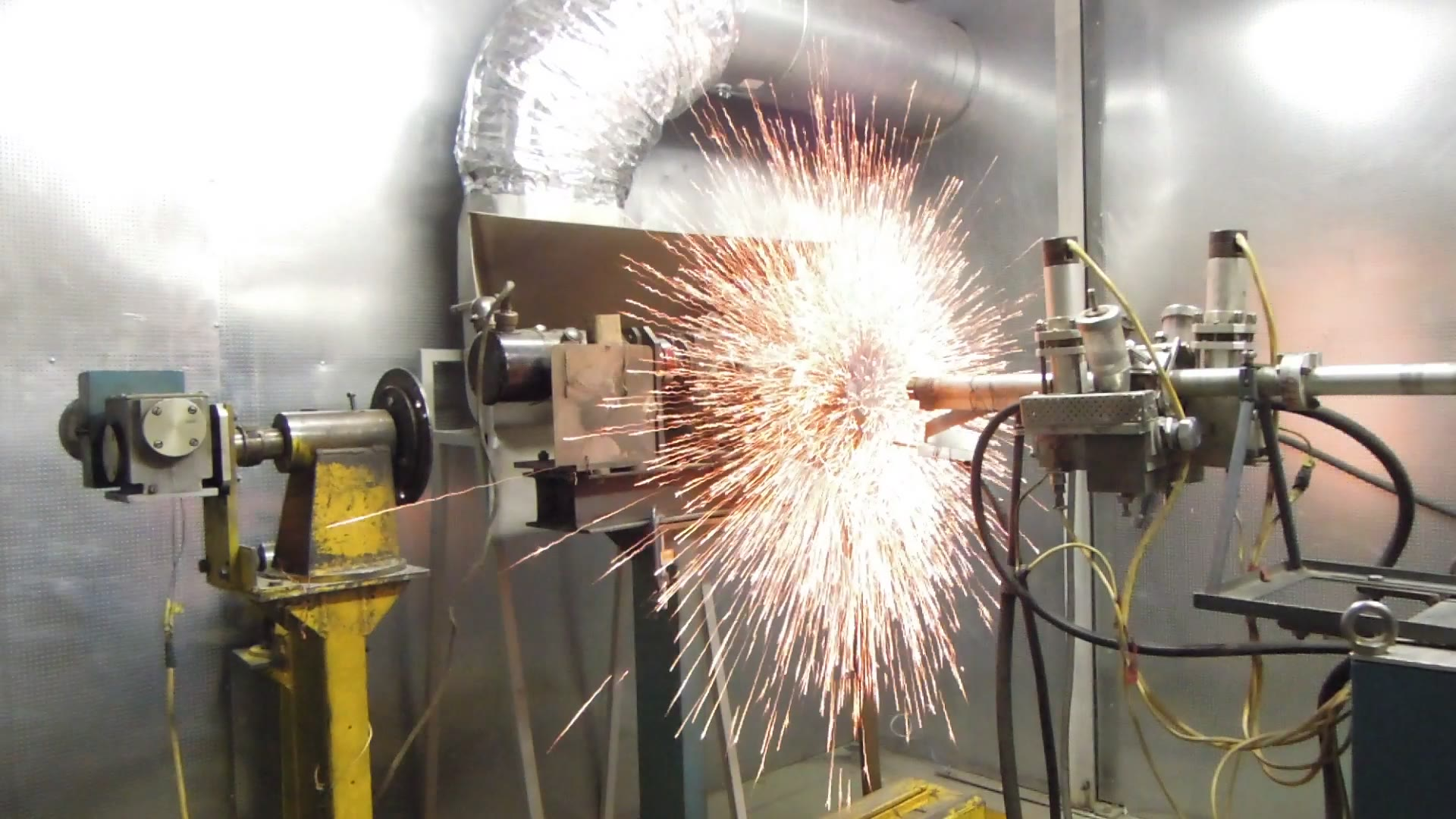 Детонационное напыление в г. Щербинка (Центр функциональных покрытий ЗАО "Плакарт")